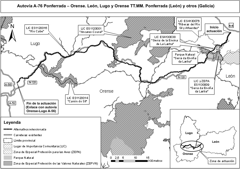 Trazado Definitivo A-76 Ponferrada-Ourense BOE 14-ago-2013